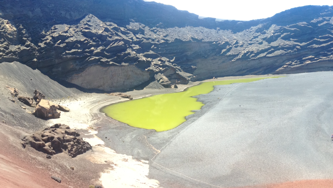 Charco de los Clicos, Lanzarote